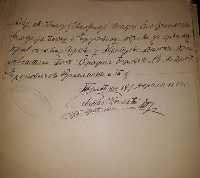 Blagoslov mitropolita Serafima Perovića